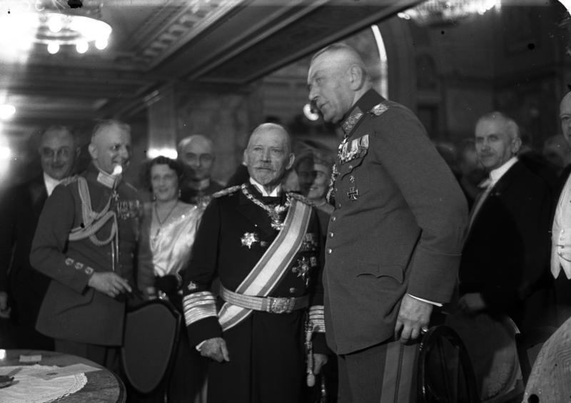 Die grosse Kaiser-Geburtstagsfeier des Nationalverbandes deutscher Offiziere im Marmorsaal des Berliner Zoo ! Der bekannte deutsche Admiral von Schröder in Admiralsuniform, der Ehrenvorsitzende des Nationalverbandes deutscher Offiziere und Generalleutnant von Wächter (rechts), der Vorsitzende des Verbandes deutscher Offiziere in der Ehrenloge des Marmorsaales während der Kaiser-Geburtstagsfeier.